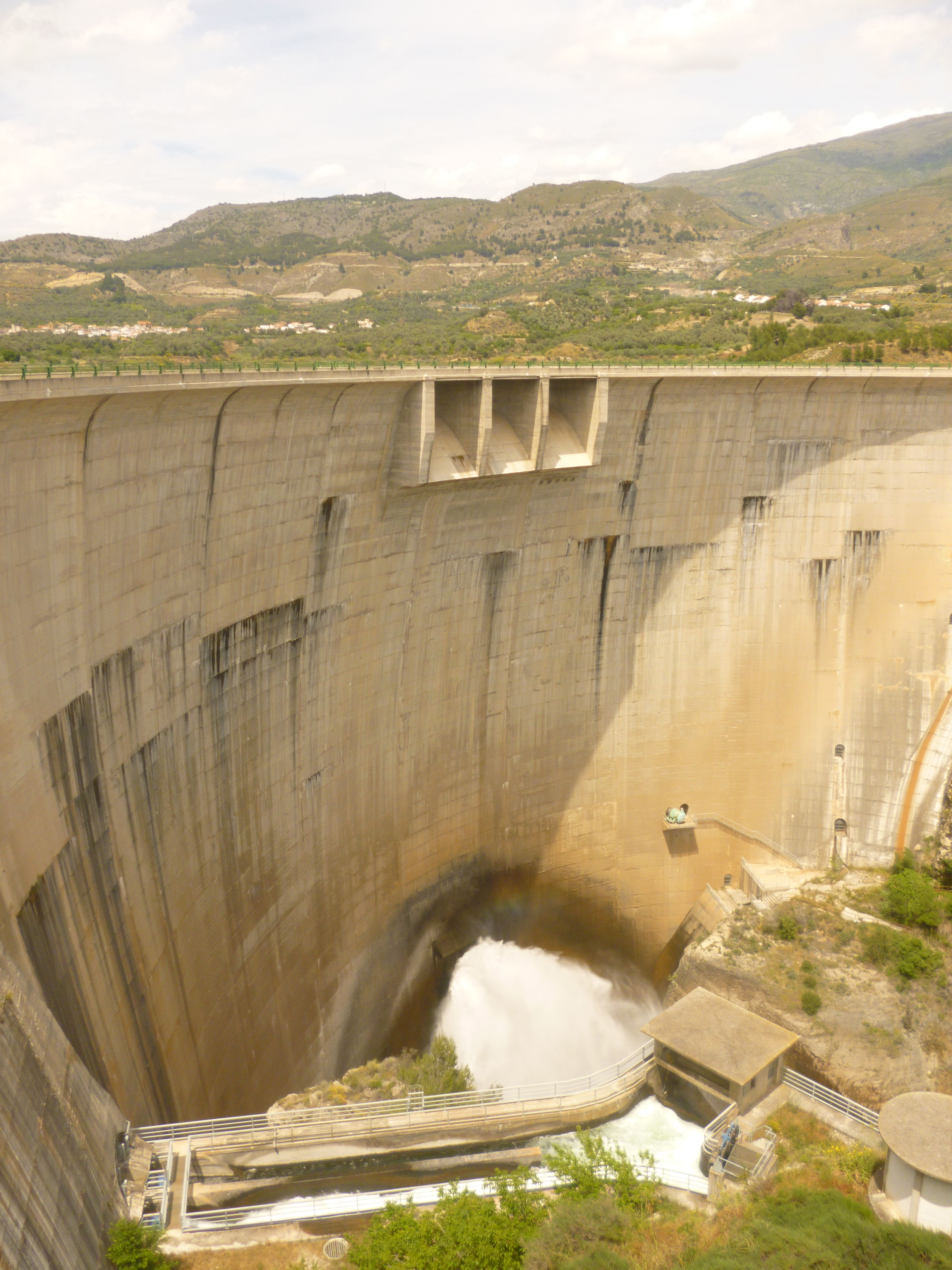 Foto desde el sur de la presa de Béznar.